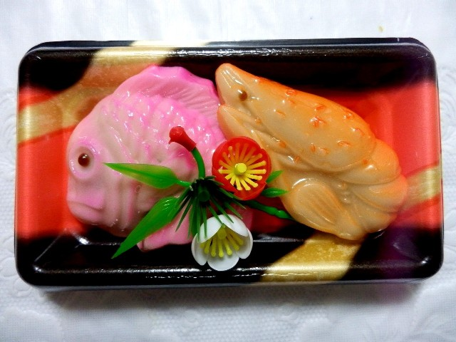 kuchi